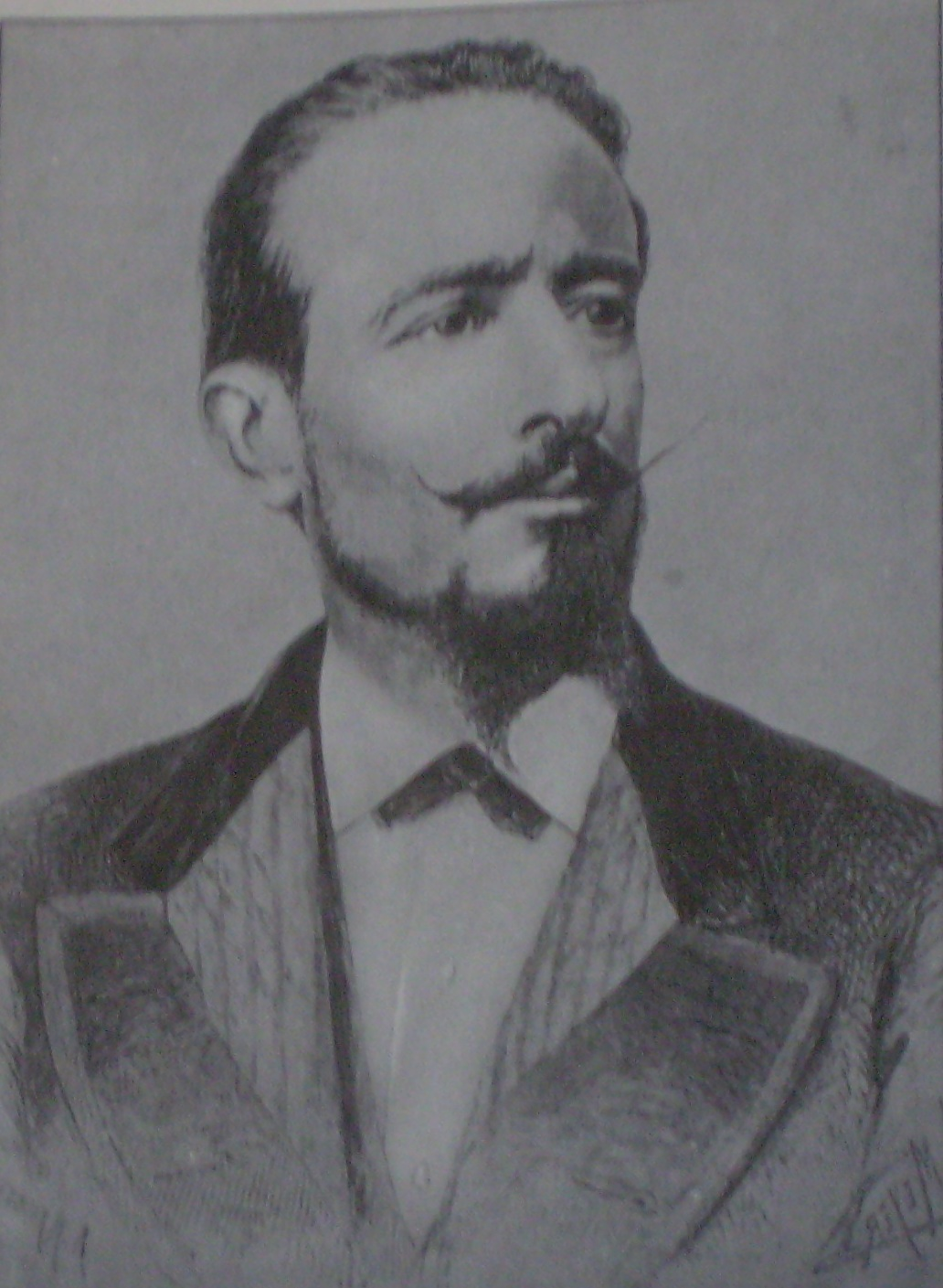 Ricardo Gutiérrez. Dibujo de H. Meyer. grabado de A. Hauger